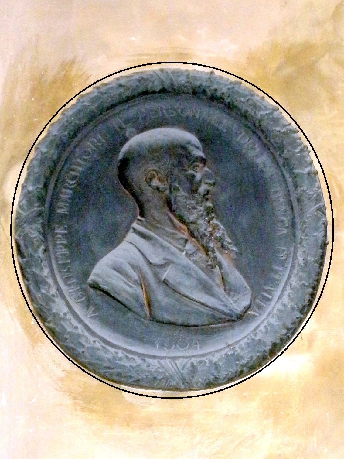 Lendinara, cimitero, Cappella cimiteriale, interno: tomba Giuseppe Marchiori, dettaglio medaglione bronzeo con profilo.